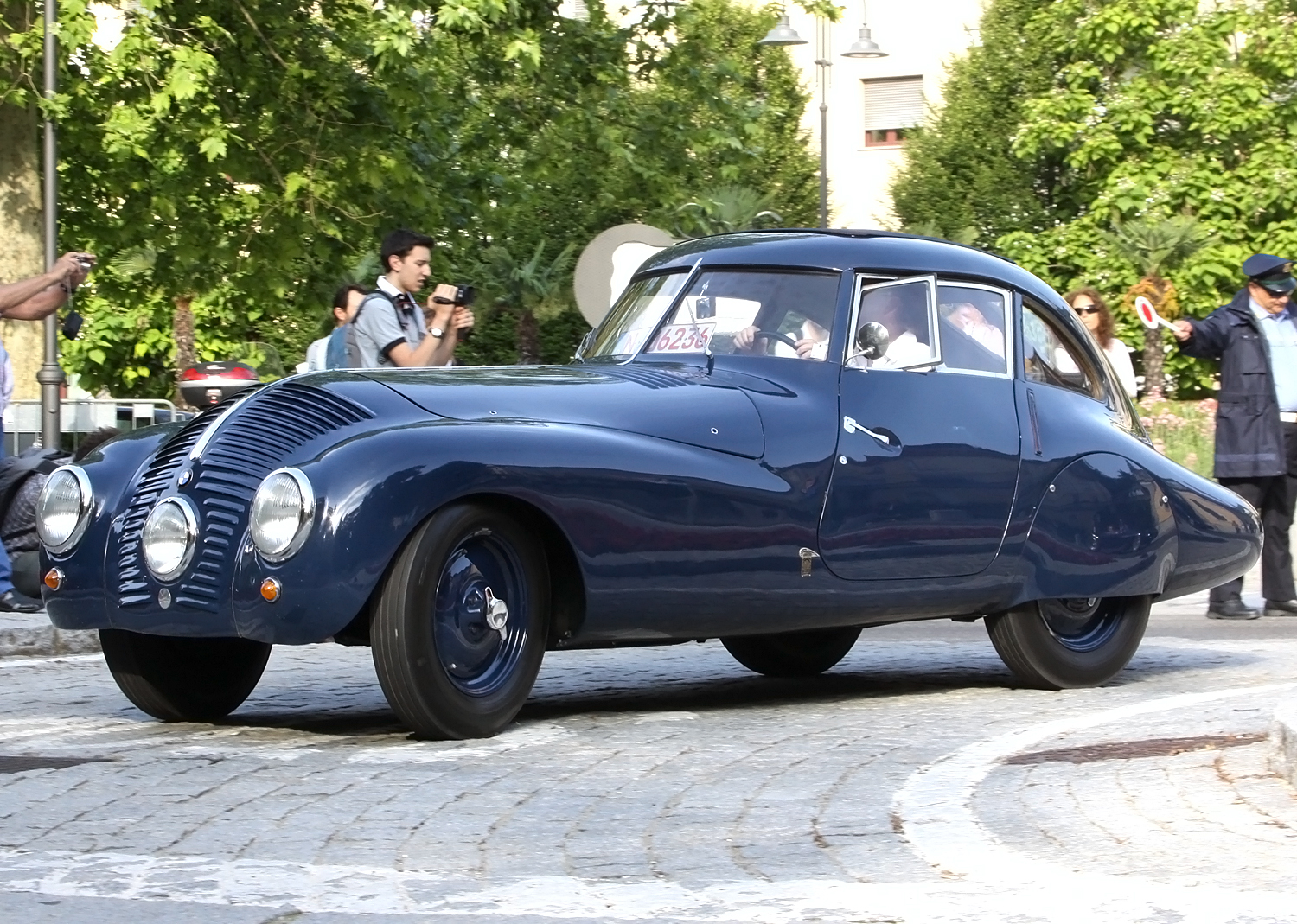 1937 BMW 328 Coupè Stromlinien Wendler at Concorso d'eleganza Villa d'Este 2014.